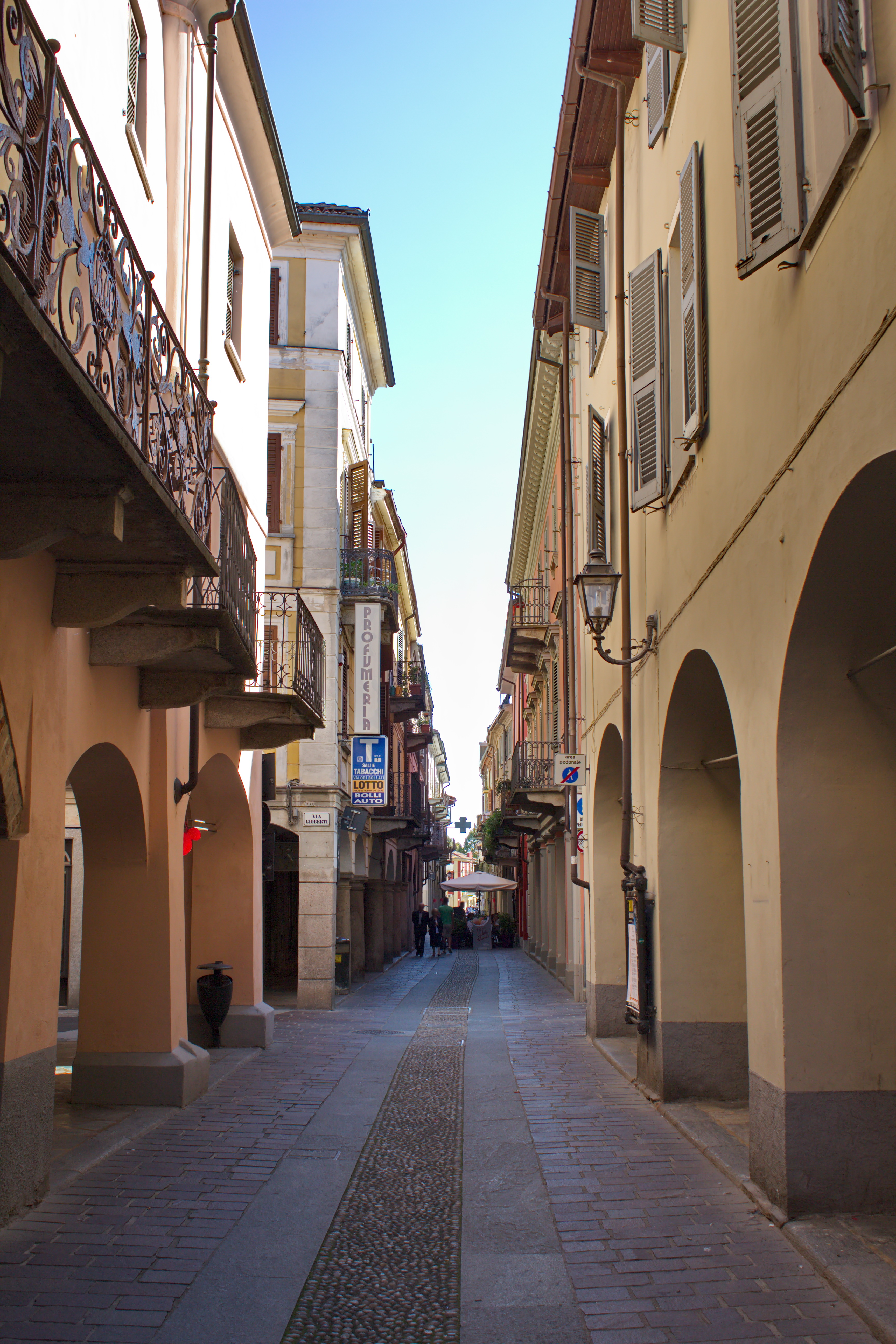 Via Carlo Alberto ("Via Maestra"), Nizza Monferrato This is a photo of a monument which is part of cultural heritage of Italy.